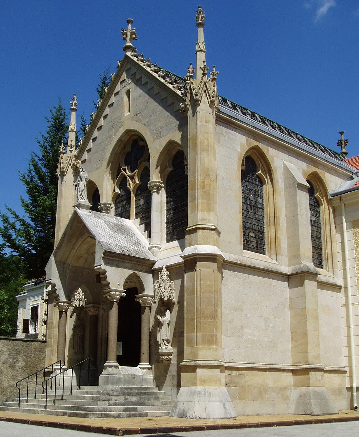 Mayerling- Portal der Kirche.